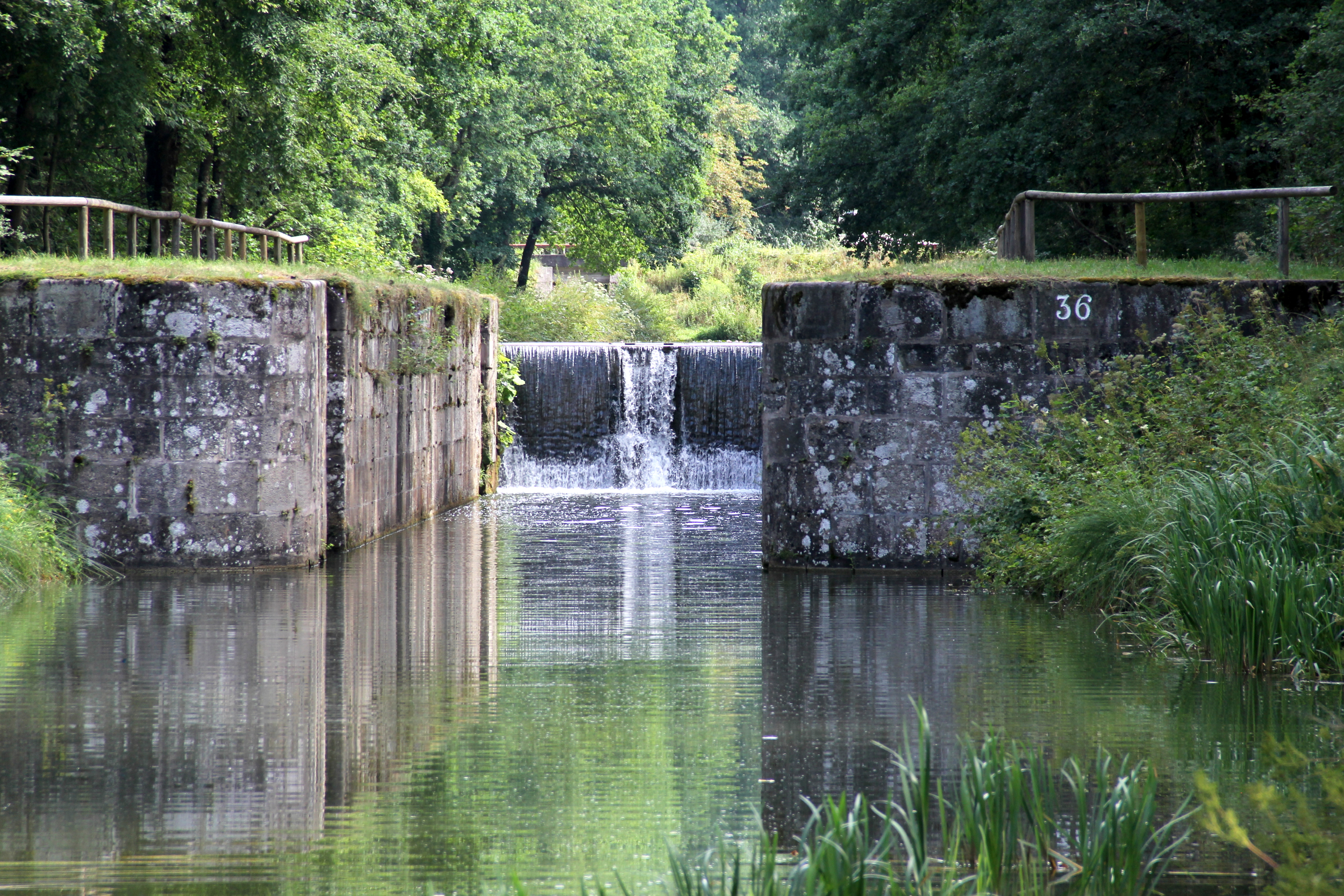 Schleuse 36